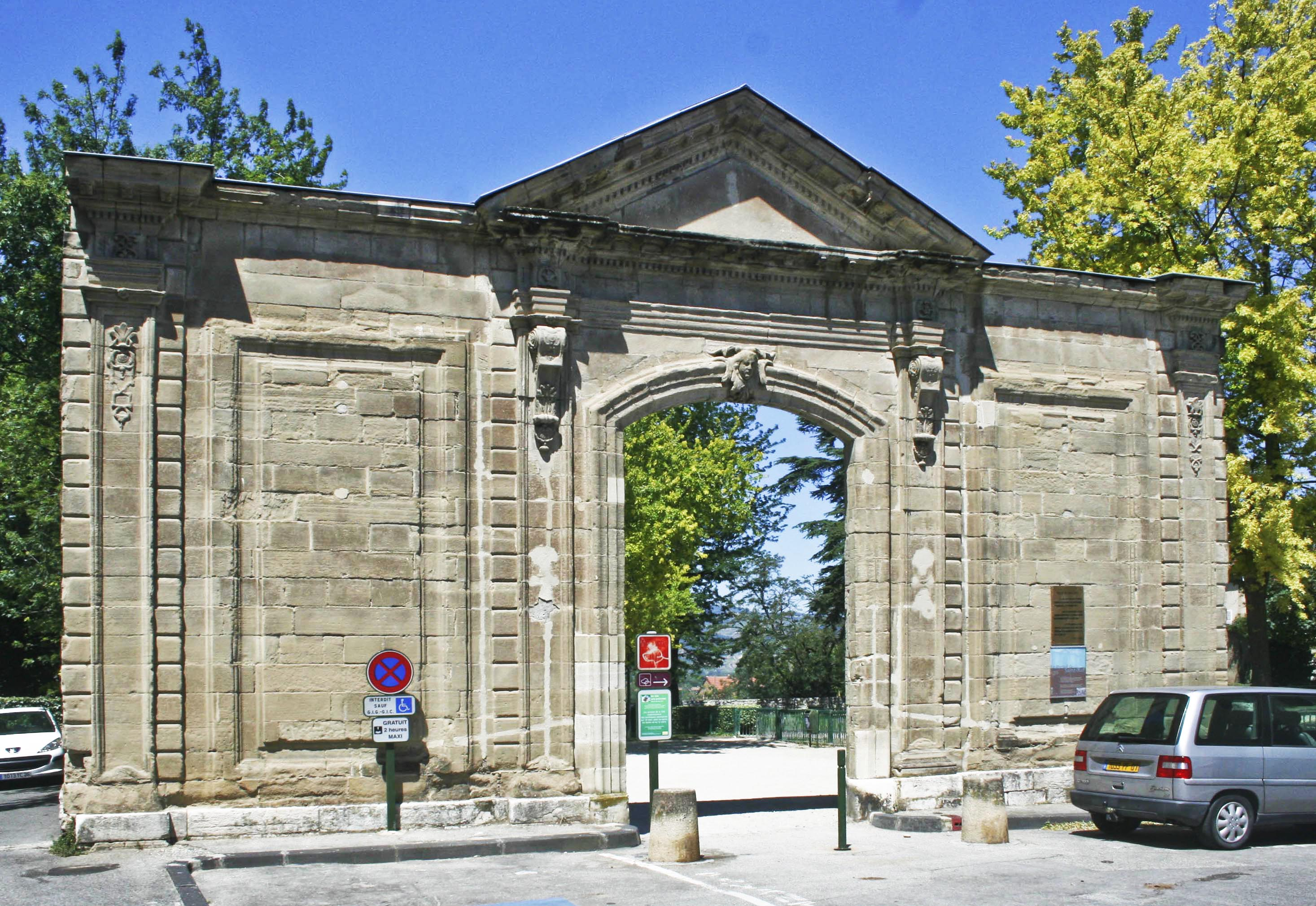 Porte de l’ancienne abbatiale Saint-Ruf, puis ancienne Préfecture de la Drôme, à Valence (Drôme, France)